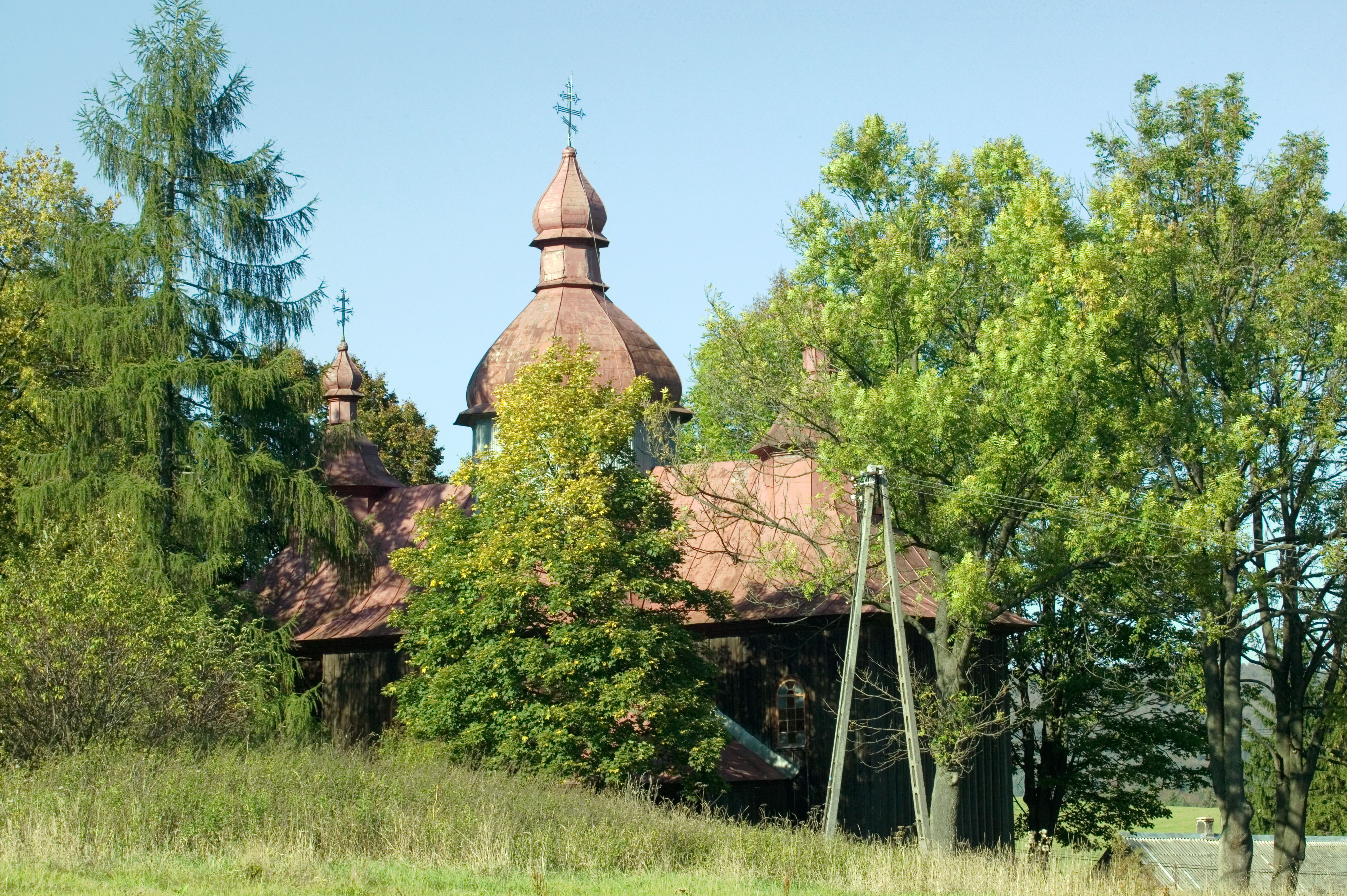 Dawna cerkiew greckokatolicka pod wezwaniem śś. Kosmy i Damiana, obecnie kościół filialny parafii w Gładyszowie pod wezwaniem Najświętszej Marii Panny